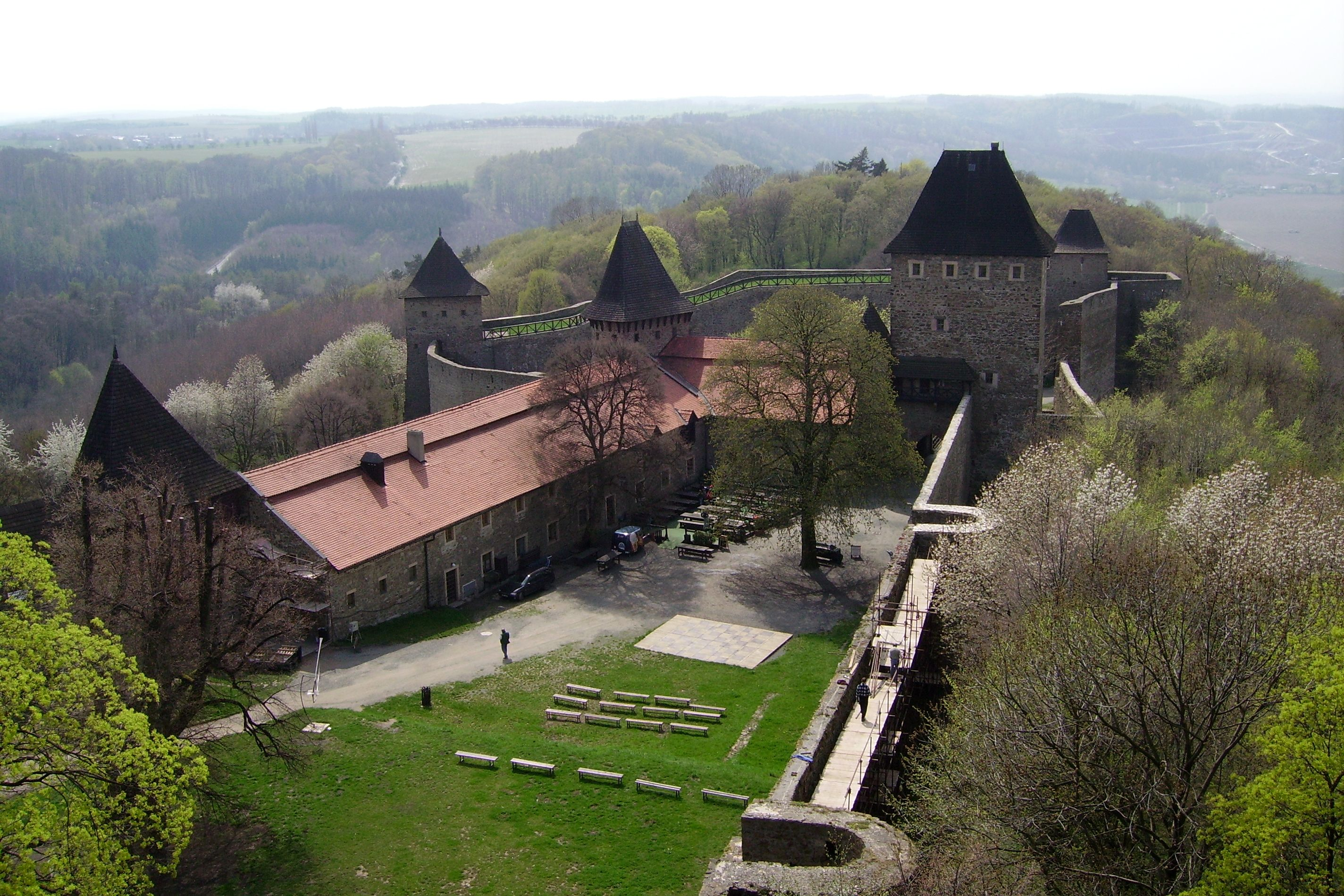 Helfst03.JPG